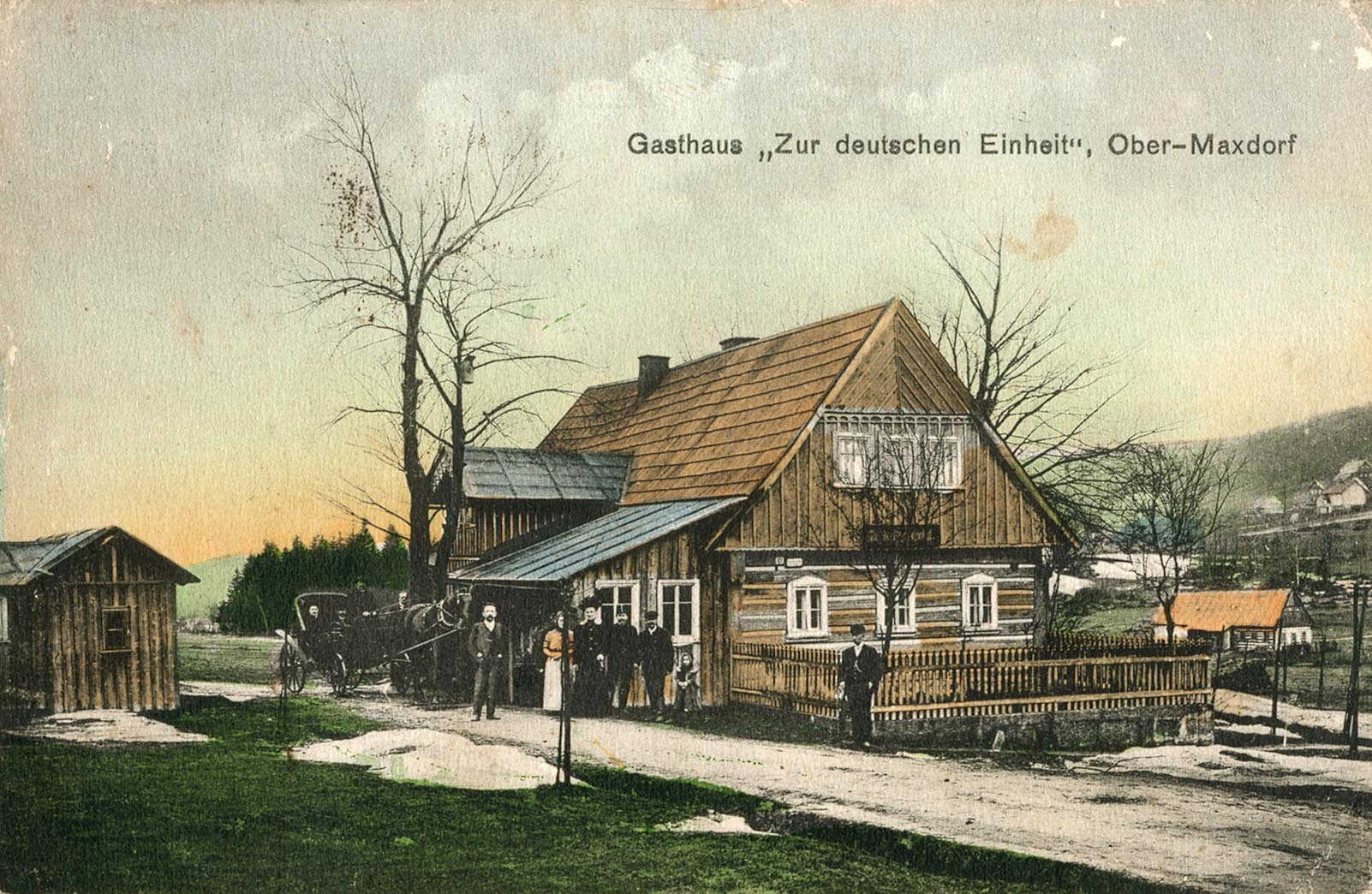 Hostinec Maxov